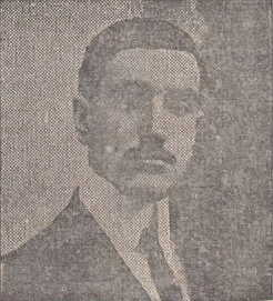 El político español Fernando Suárez de Tangil, conde de Vallellano, en La Acción de Madrid